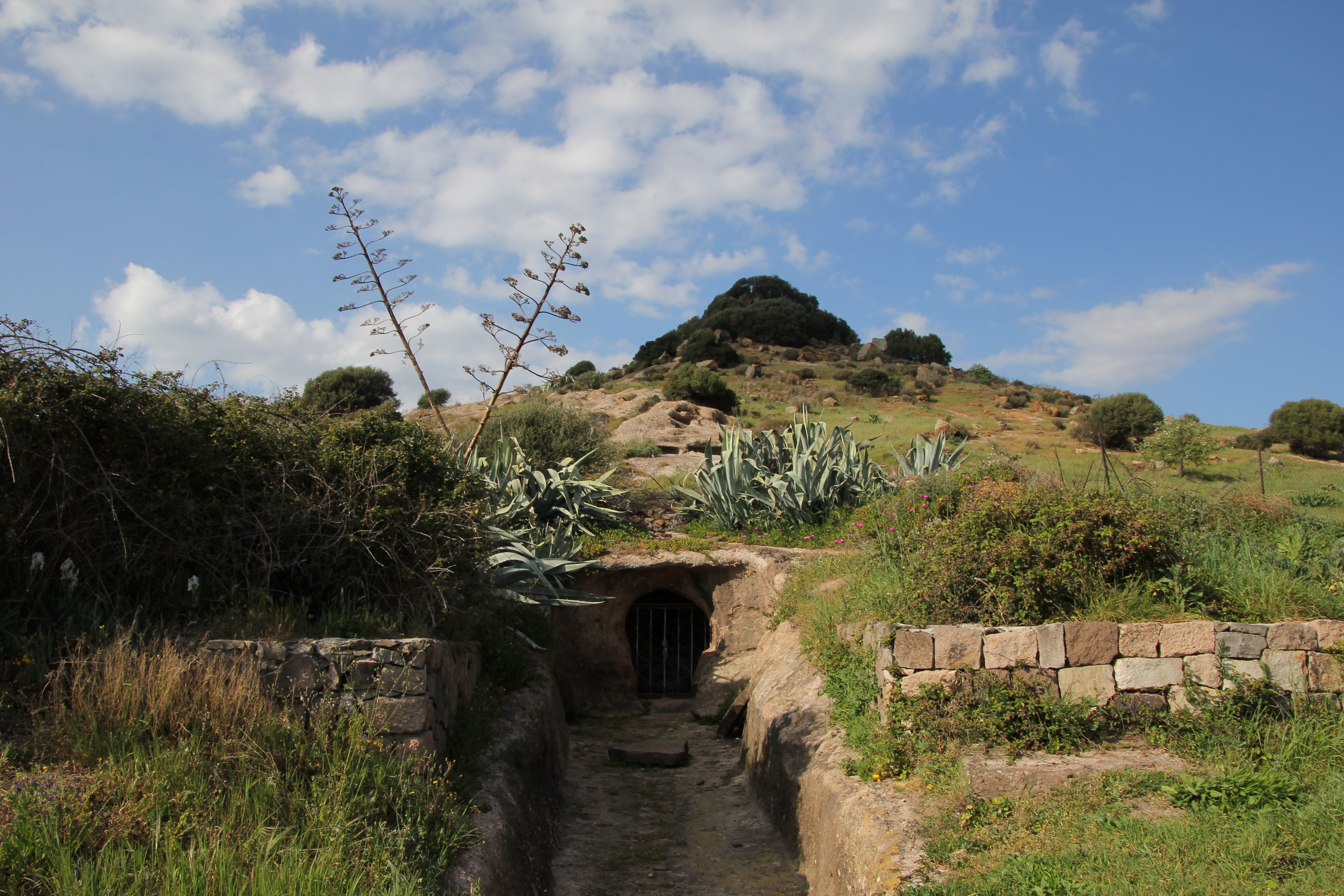 Alghero, necropoli di Santu Pedru